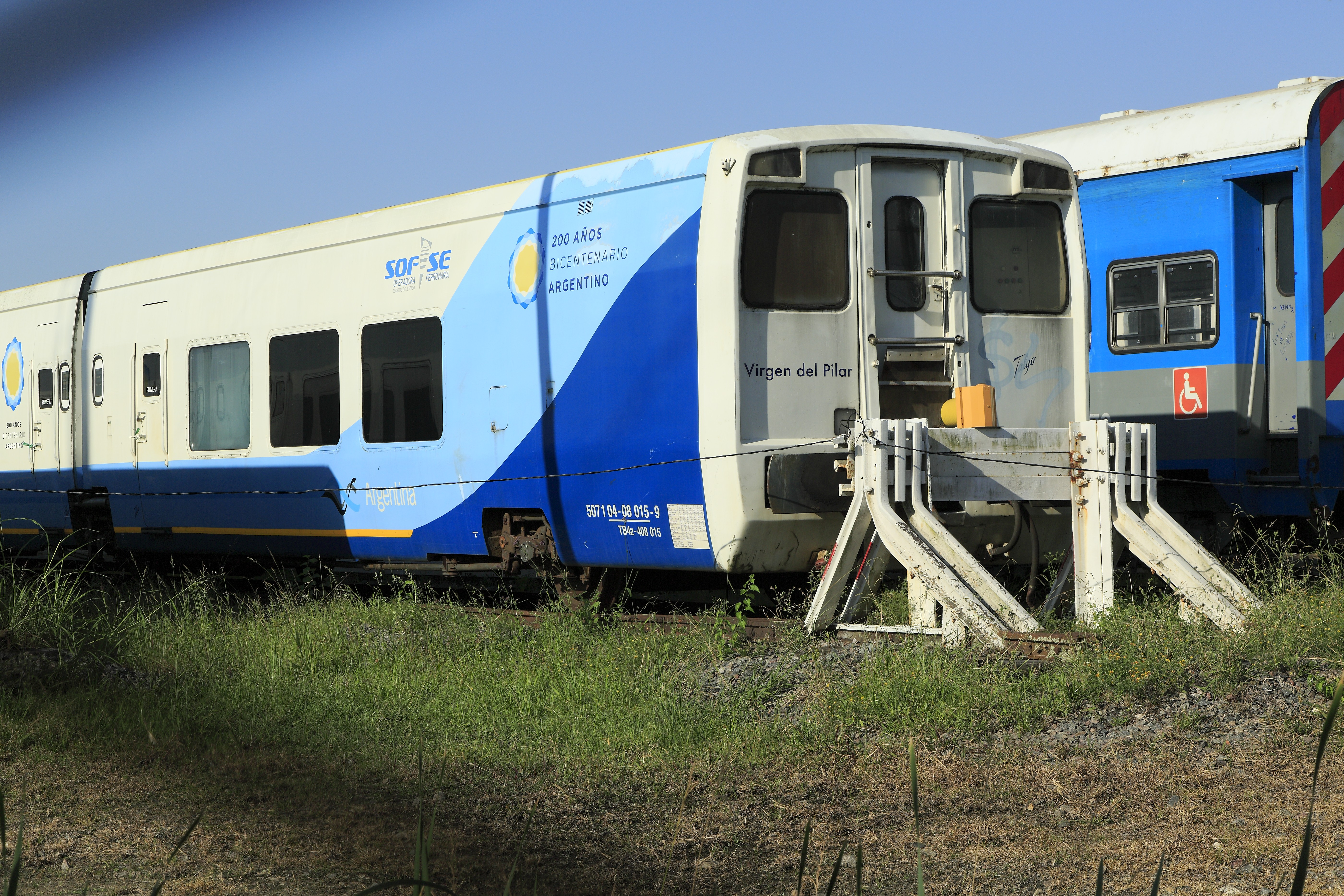 Eine der Talgo-Pendular-Einheiten, die von der Renfe übernommen wurden, abgestellt im Bw Victoria. Warum die Talgo-Einheiten nicht eingesetzt werden, ist nicht zu erkennen. Bedarf wäre für die Tagzugeinheiten durchaus vorhanden, beispielsweise für häufigerere Fahrten Richtung Rosario oder Mar del Plata. Die Einheiten sind Talgo 4, erkennbar an den großen Seitenfenstern und den nach innen öffnenden Klapptüren bei jedem Wagen. Die Talgo-Wagen behielten die Talgo- und UIC-EDV-Nummern, obwohl diese auf beiden amerikanischen Kontinenten ungebräuchlich sind. Bei den Talgo 4 (bis 6) ist der Personenendwagen der Wagen mit zwei Laufwerken.